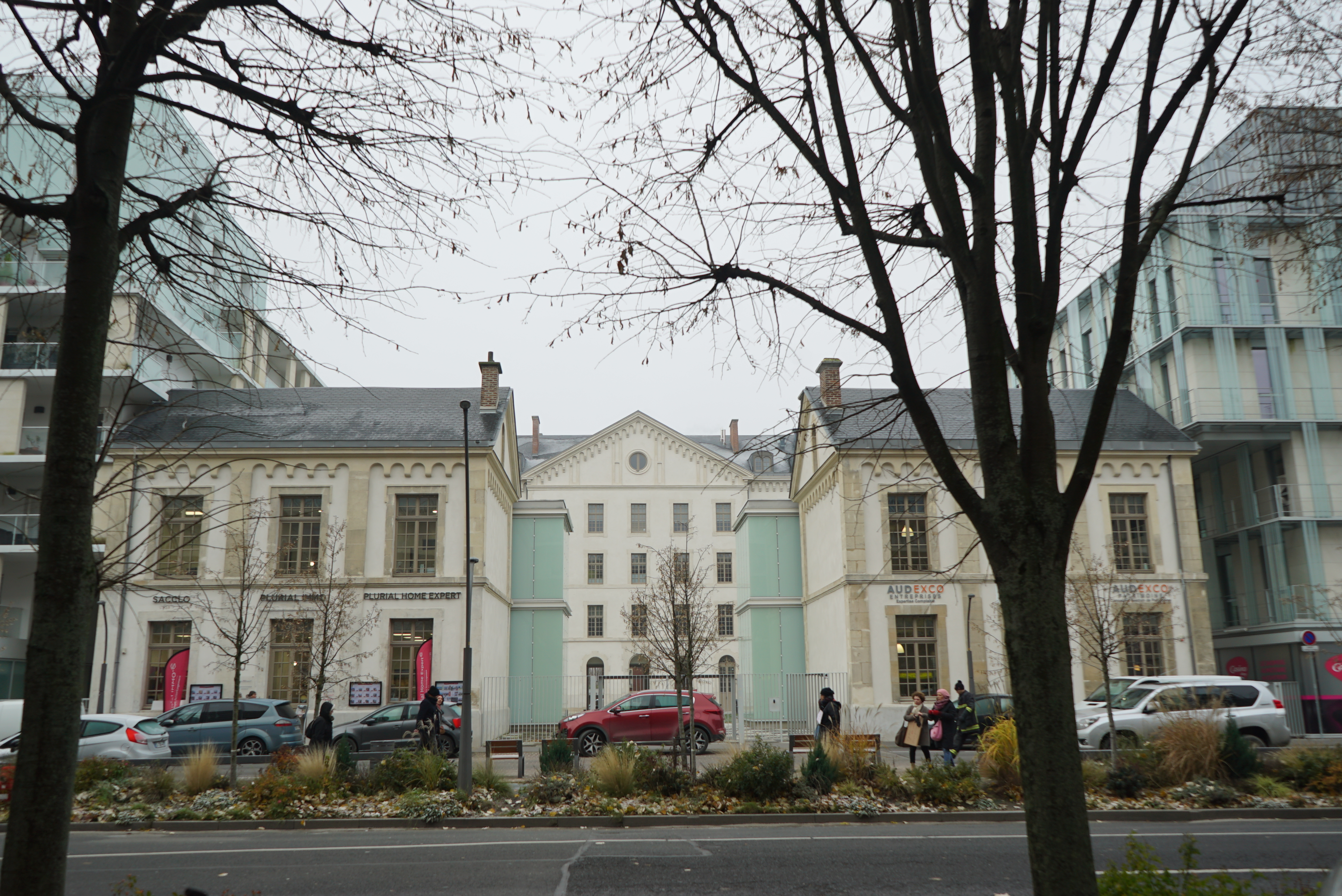 Entrée actuelle, 2020.